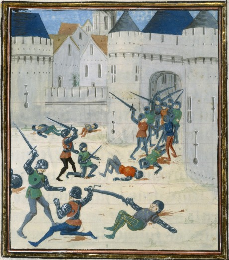 Prise de Vannes (1342) dans Jean de Wavrin, Chroniques d'Angleterre